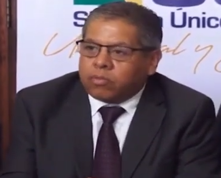 Alcalde Iván Tellería en enero de 2019